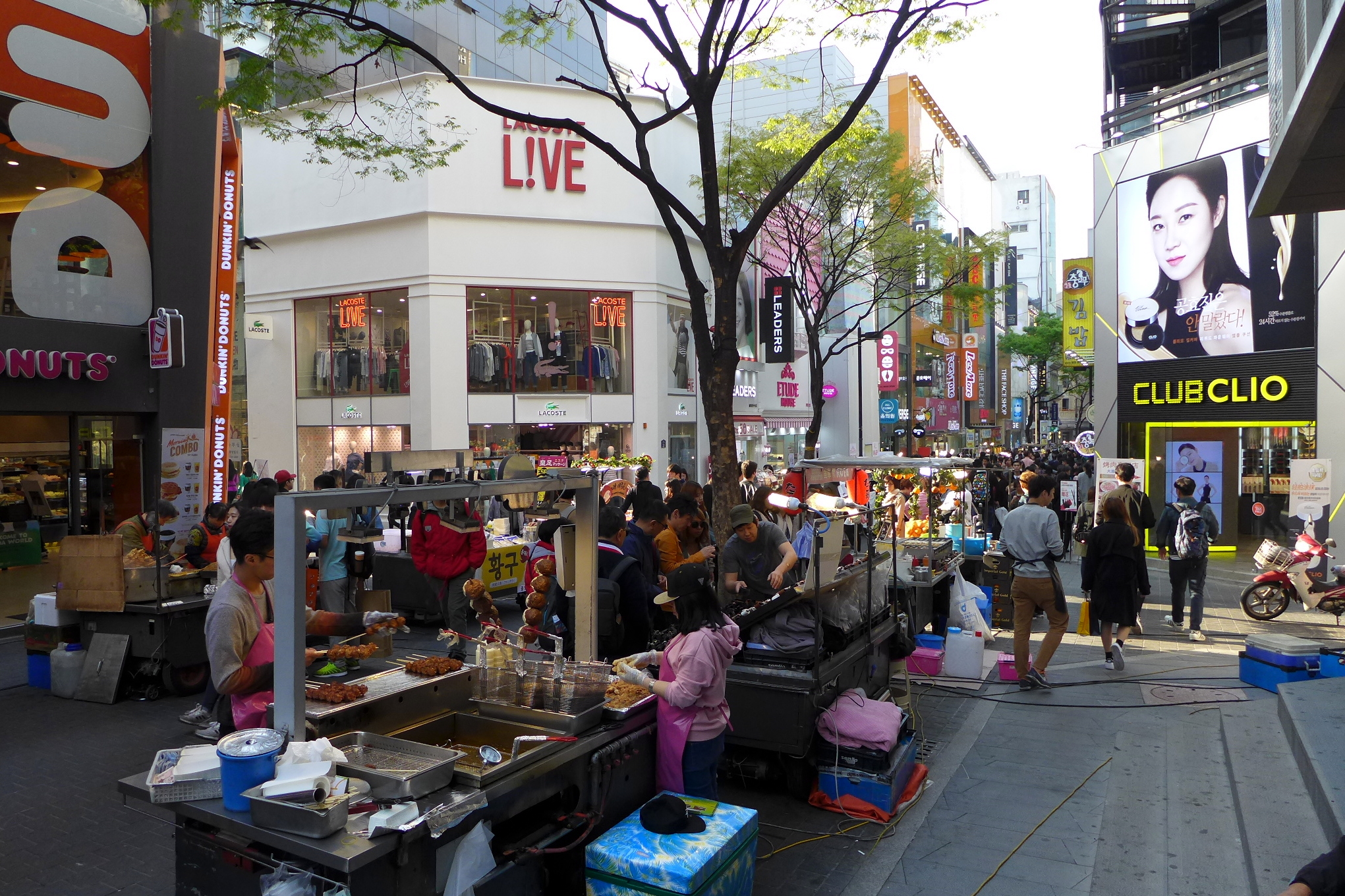 Myeong-dong Hawkers